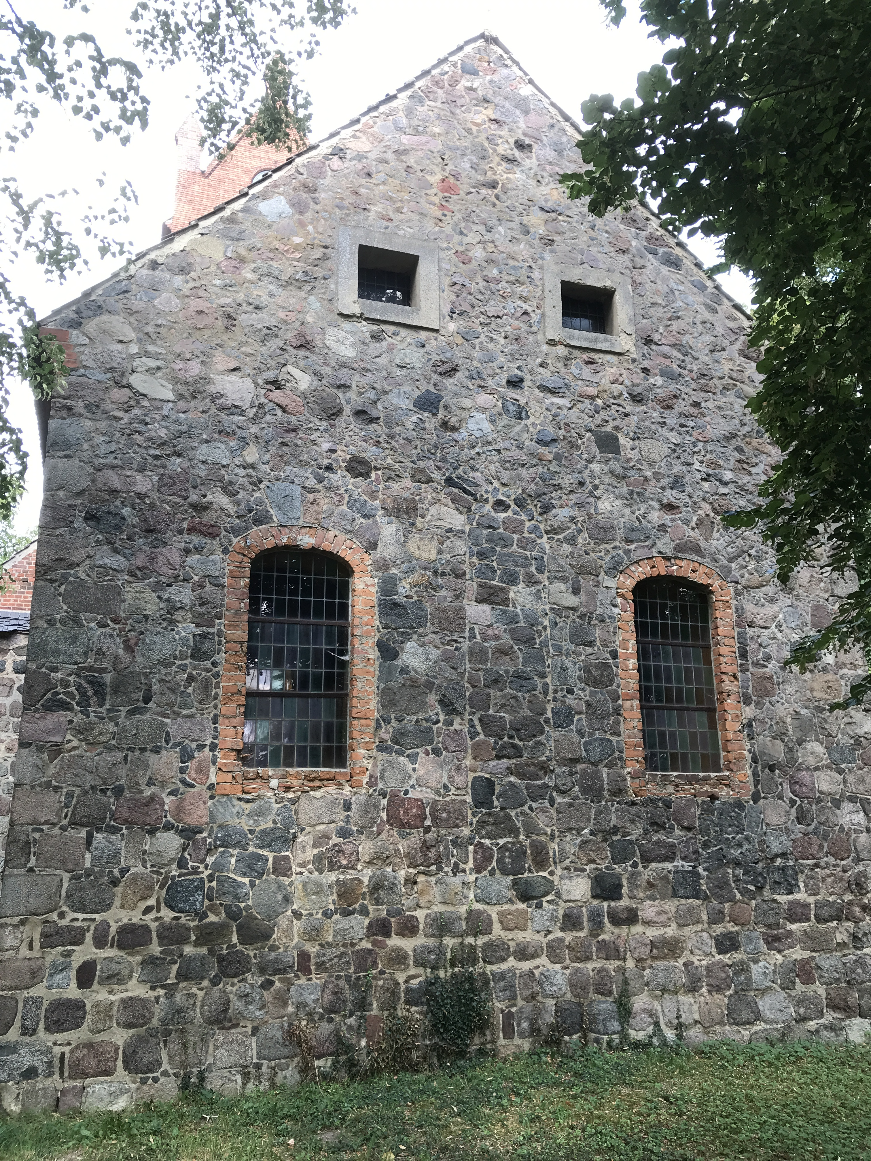 Die Dorfkirche Hasenfelde der Gemeinde Steinhöfe ist eine spätgotische Saalkirche, die 1901 umgebaut wurde. Im Innern steht unter anderem eine Kanzel aus dem Anfang des 18. Jahrhunderts.